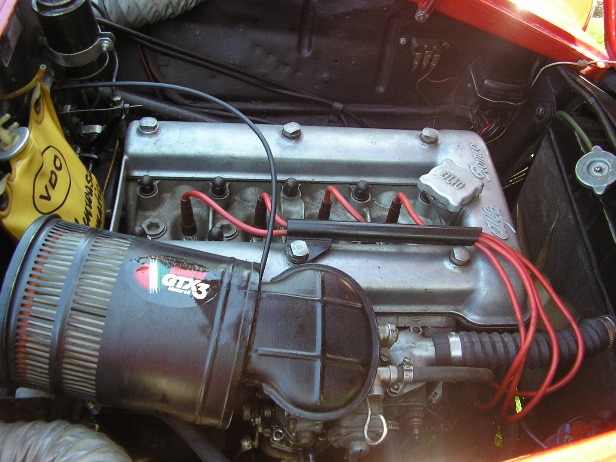 1962 Alfa-Romeo Guiletta engine